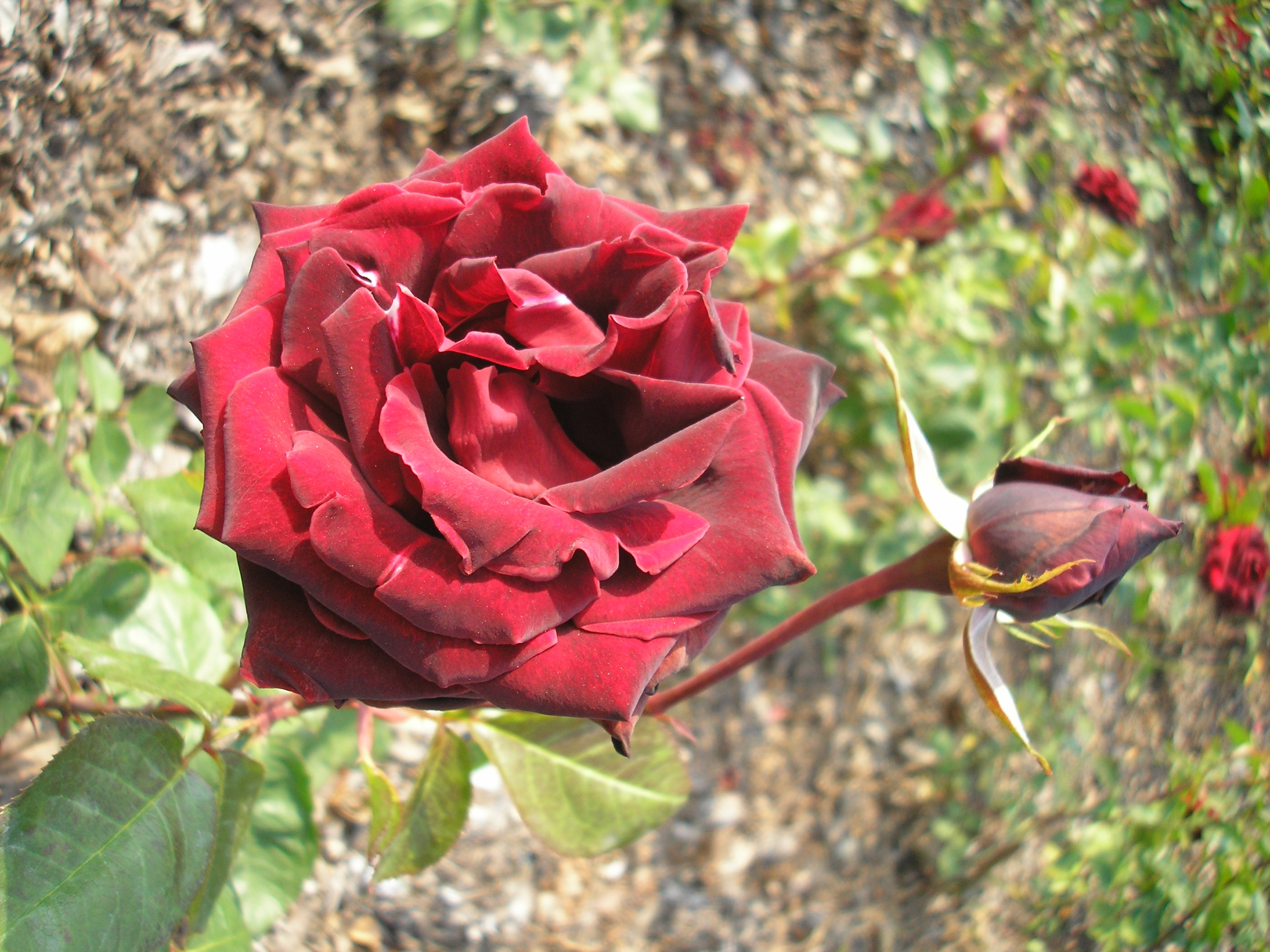 Rose et bouton 'Perle Noire', roseraie de la Colline aux Oiseaux à Caen (Normandie, France).